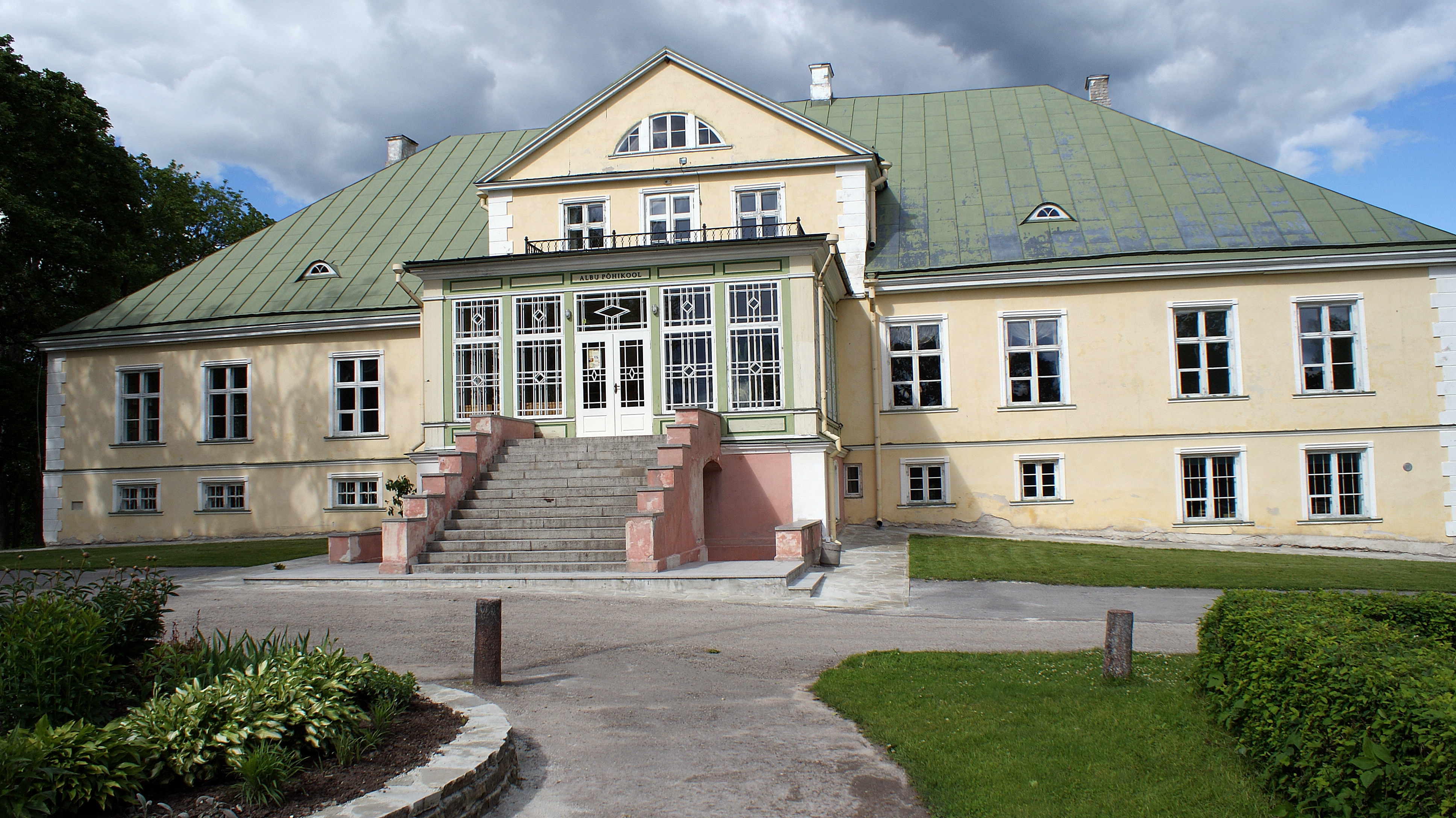 Albu mõisa peahoone